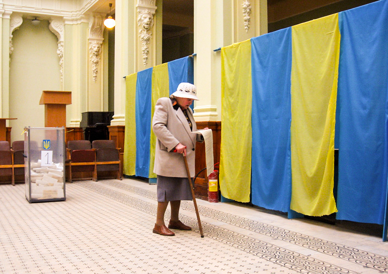 Senior elector deciding about electoral choice